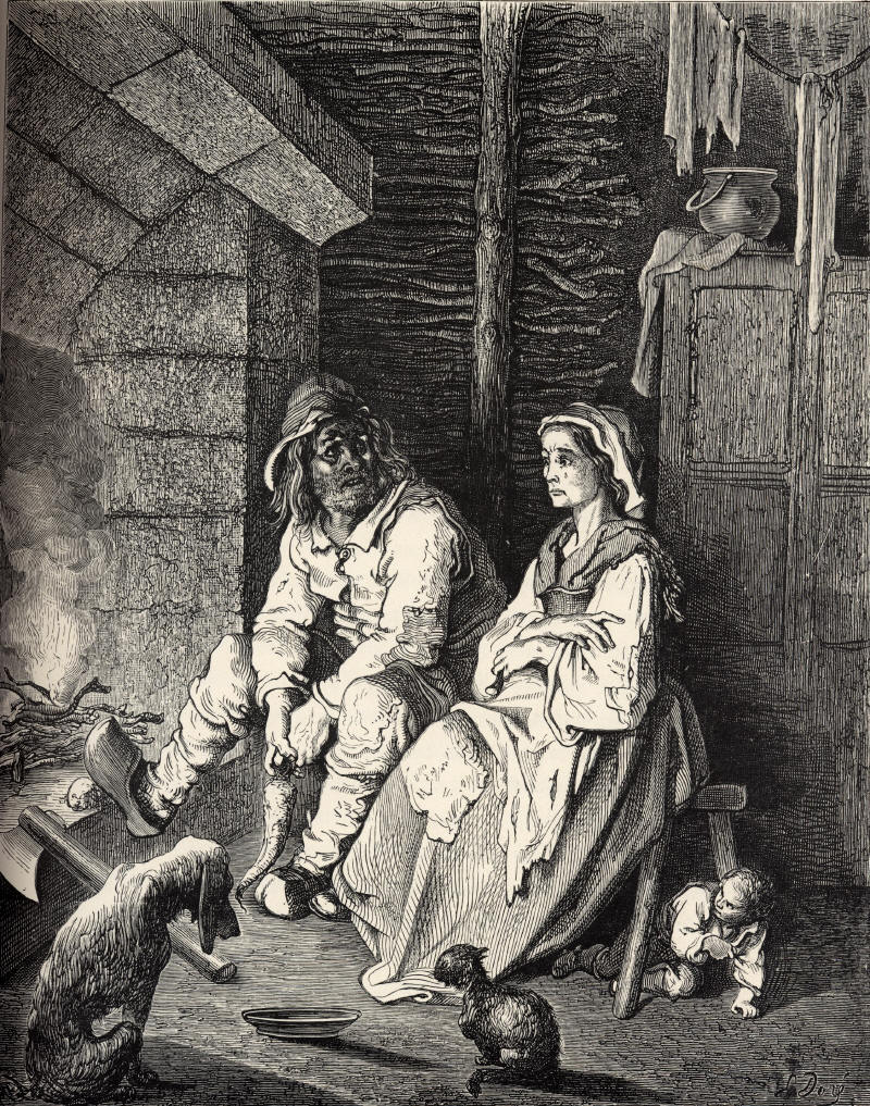 Illustration for Charles Perrault's Le Petit Poucet from Histoires ou Contes du Temps passé: Les Contes de ma Mère l'Oye(1697). Gustave Doré's illustrations appear in an 1867 edition entitled Les Contes de Perrault. First of eleven engravings